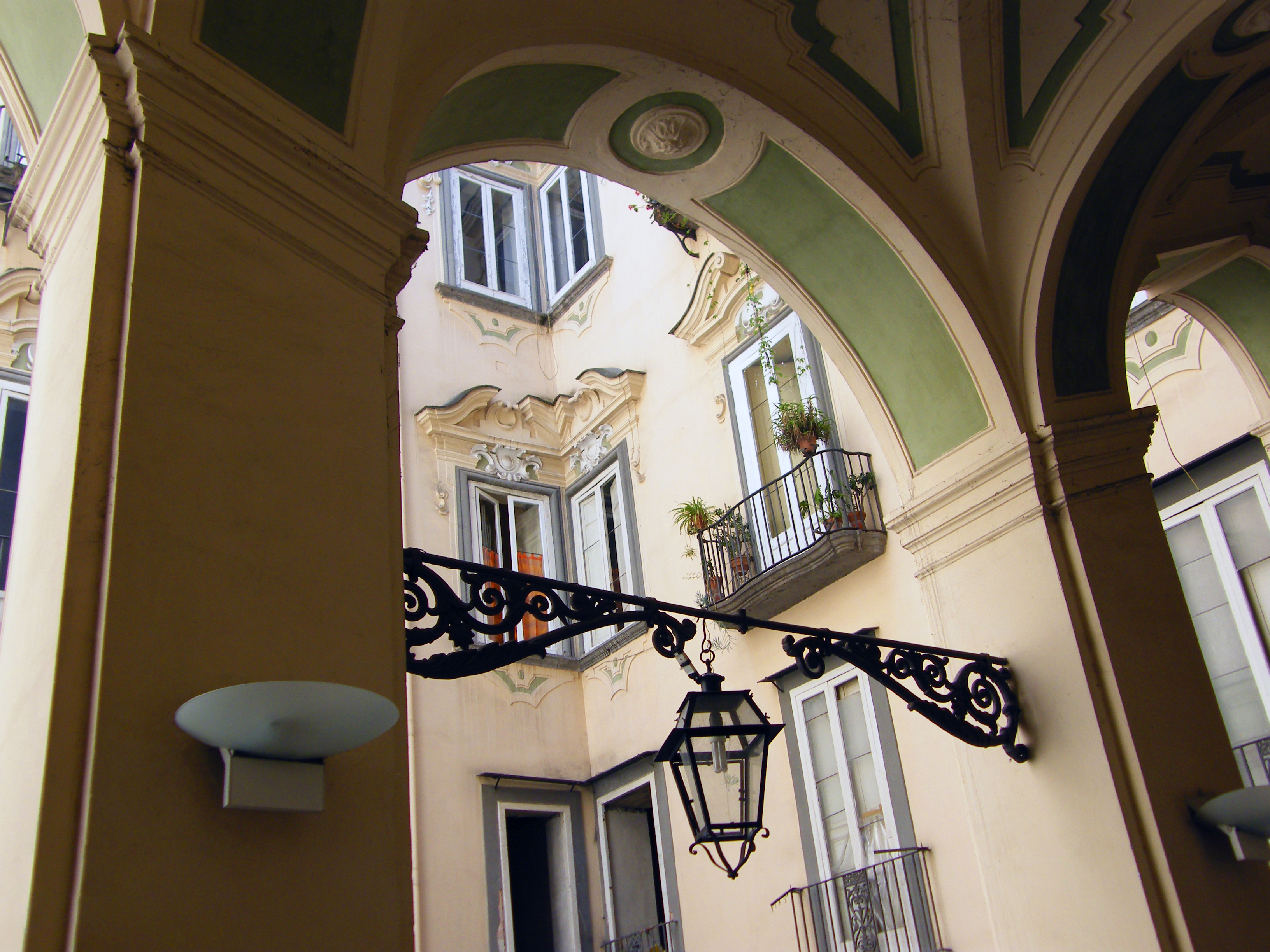 Particolare del palazzo dello Spagnolo (Napoli). Vista dall'interno della scalinata monumentale del Sanfelice.